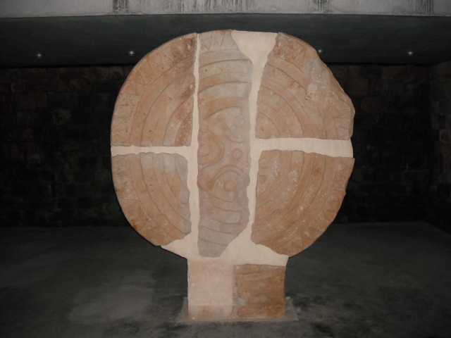 Estela gigante de Barros II